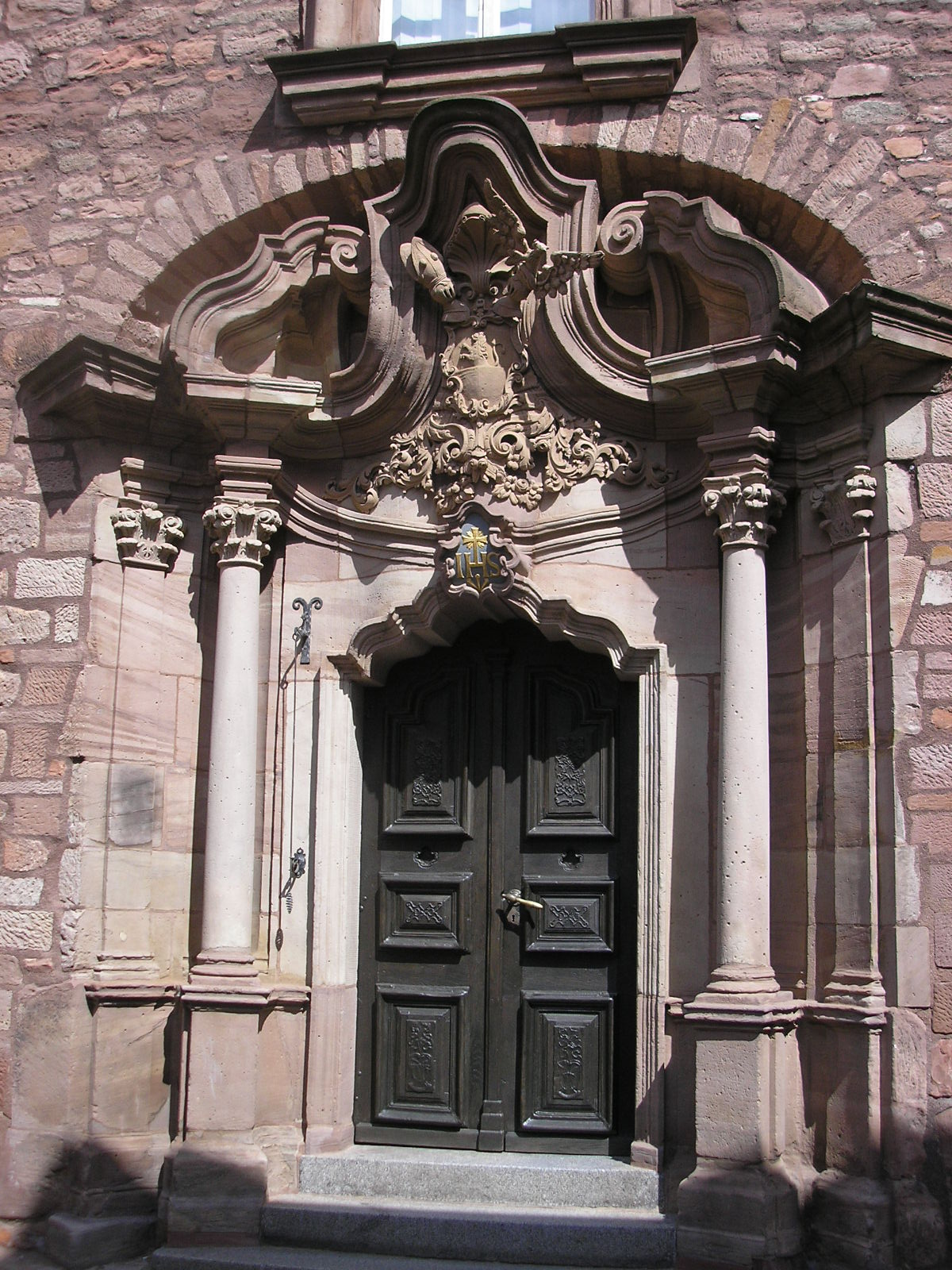 Eingangsportal des Jesuitenkollegs (heute Eichsfeldmuseum) in Heiligenstadt (Thüringen).